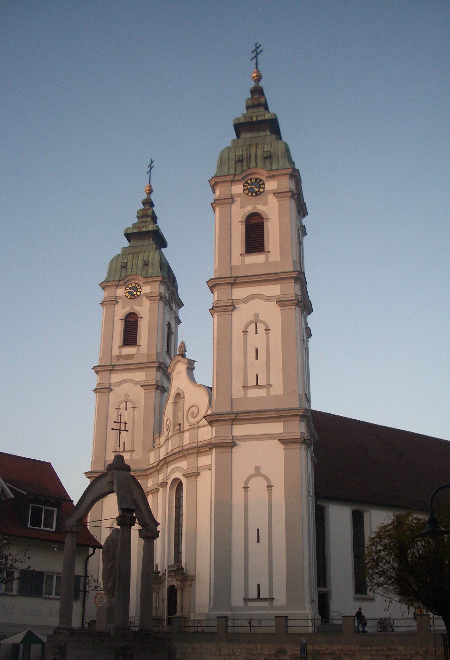 Bad Waldsee, Germany: Stiftskirche